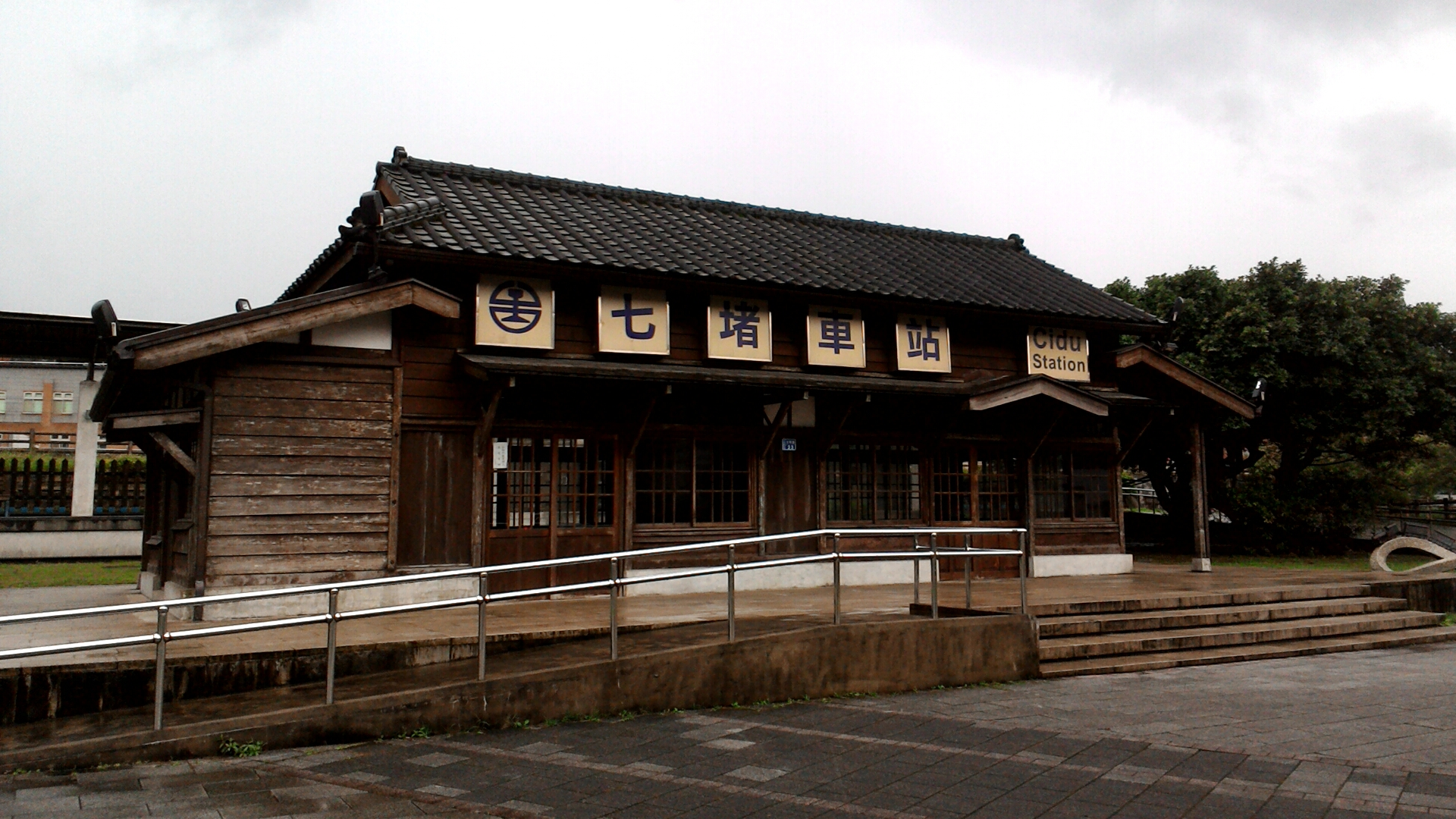 台鐵七堵前站舊站房,基隆市七堵區長興里